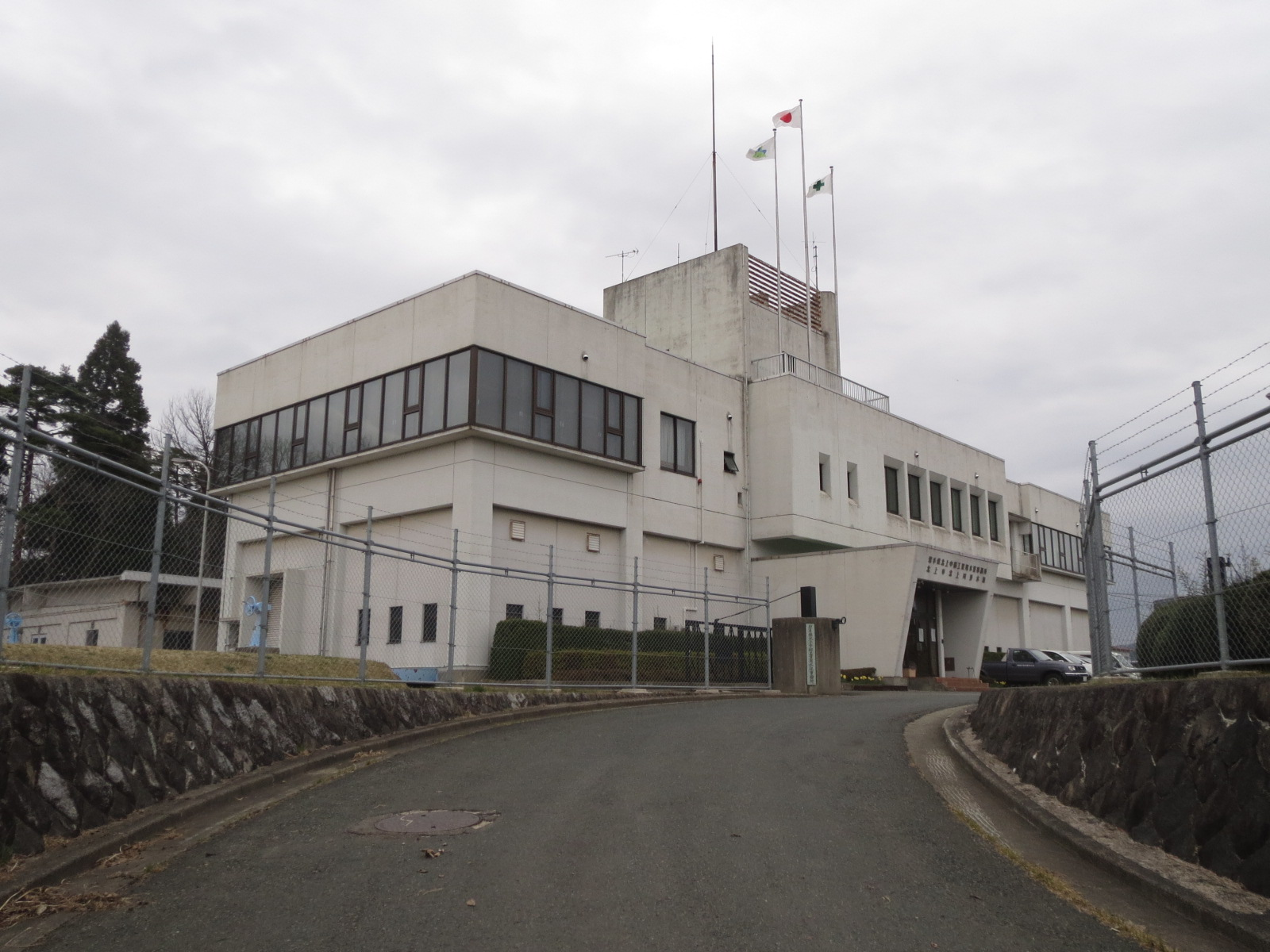 北上浄水場